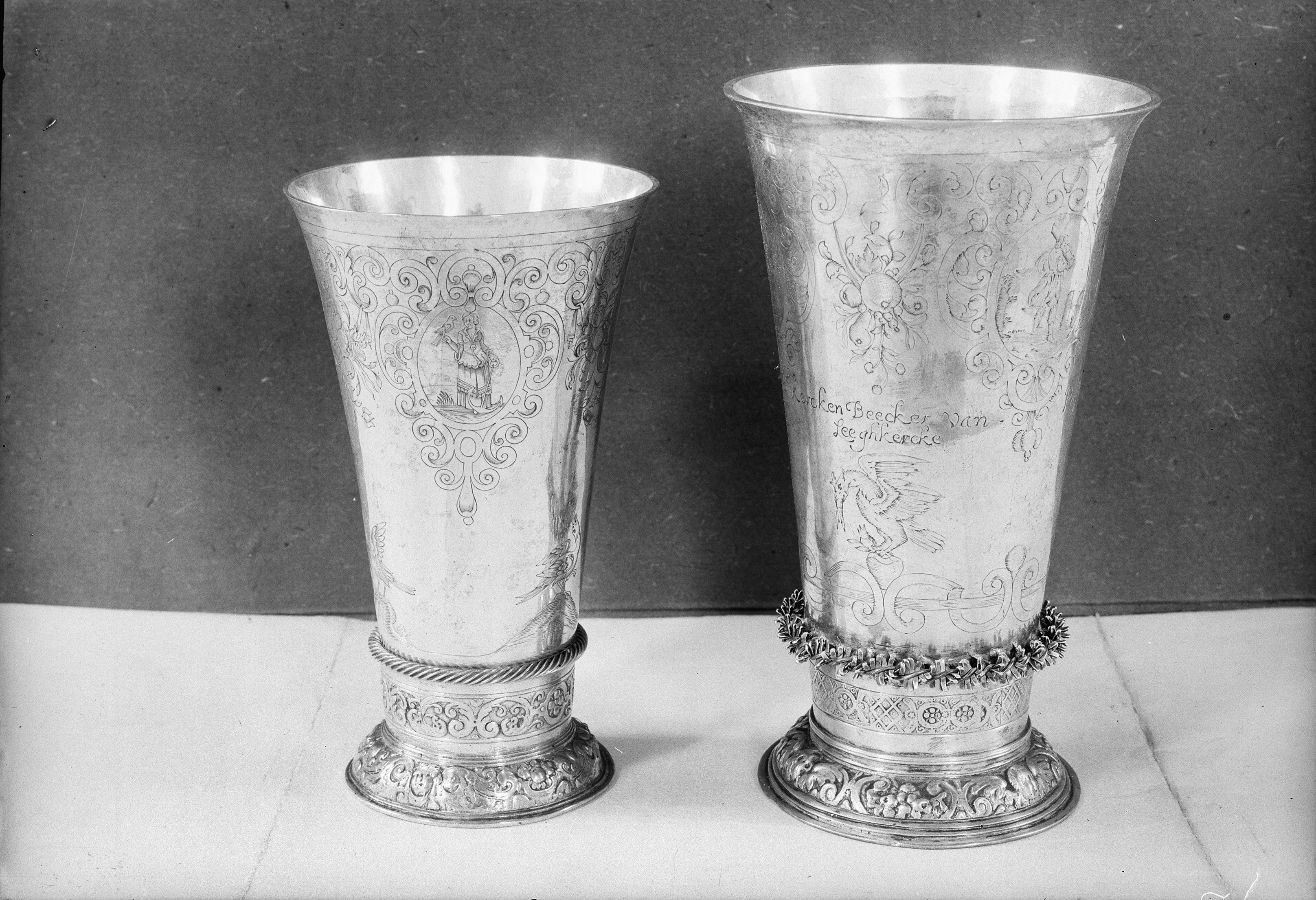 Nederlands Hervormde Kerk: avondmaalsbeker